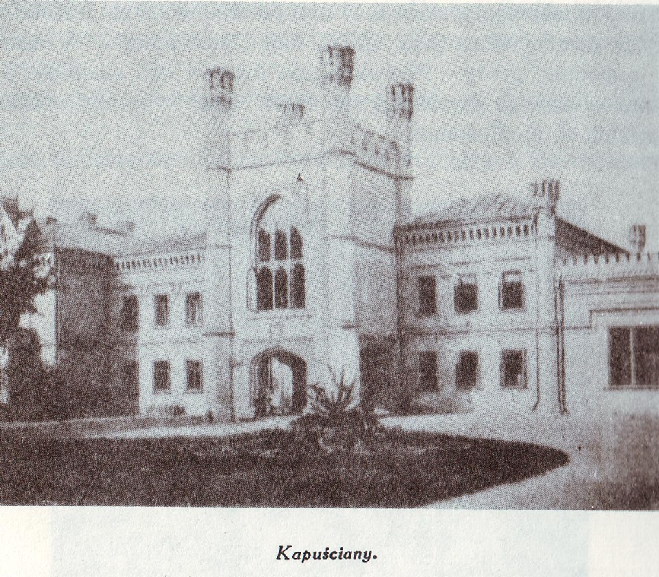 Kapuściany